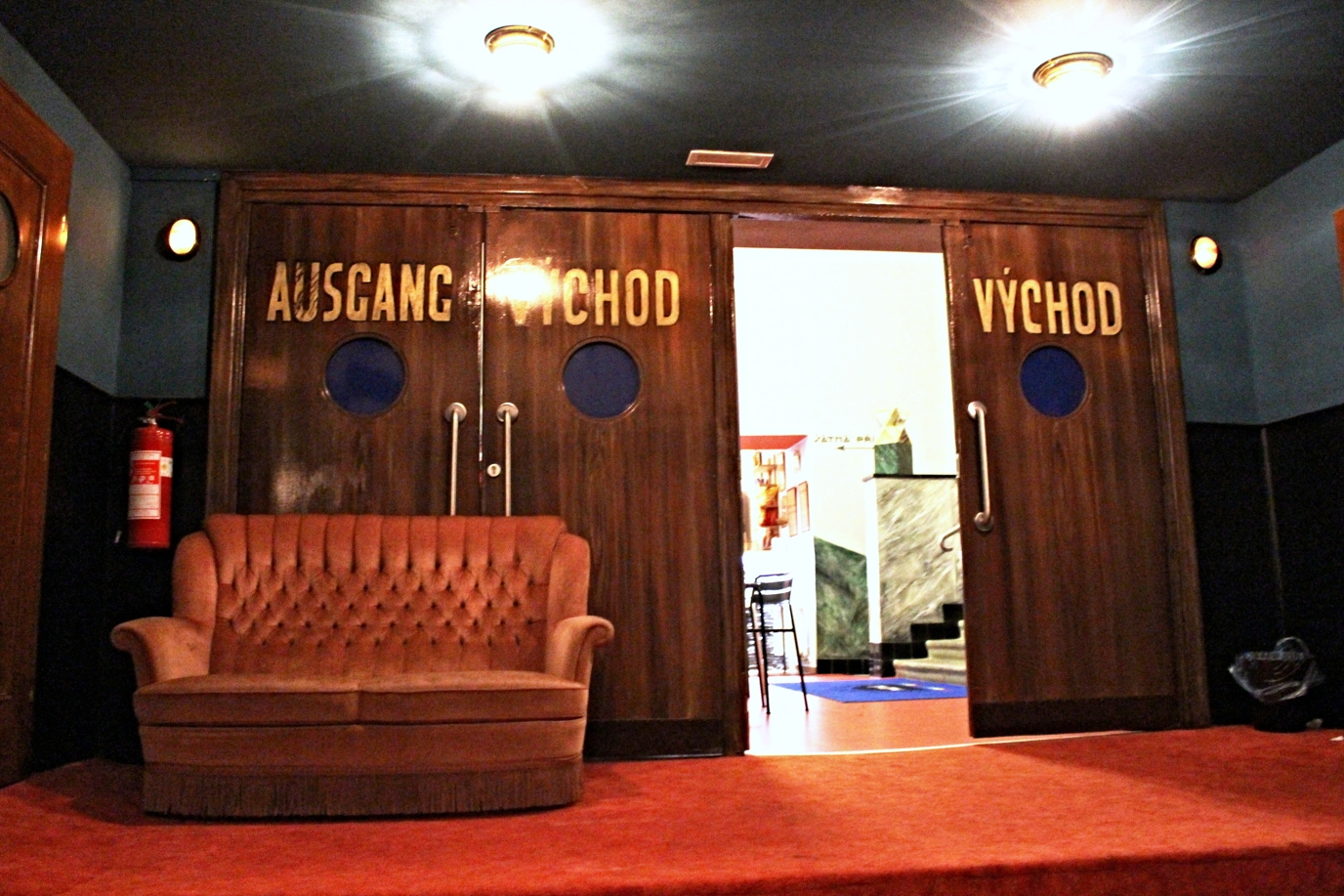 Vršovice, divadlo MANA v Husově sboru